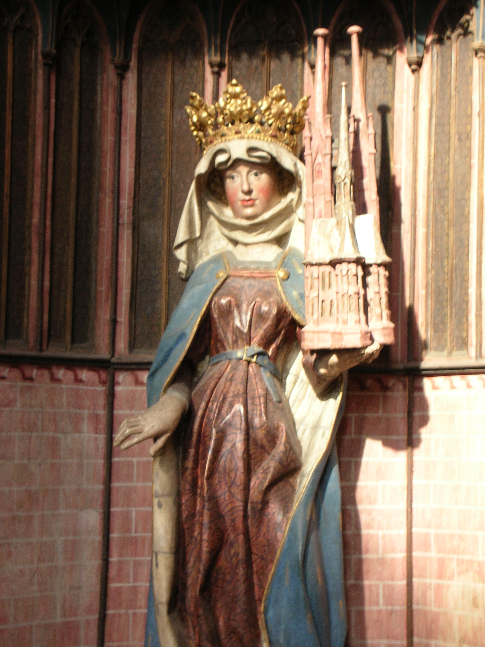 Statue der Hl. Elisabeth in der Marburger Elisabethkirche